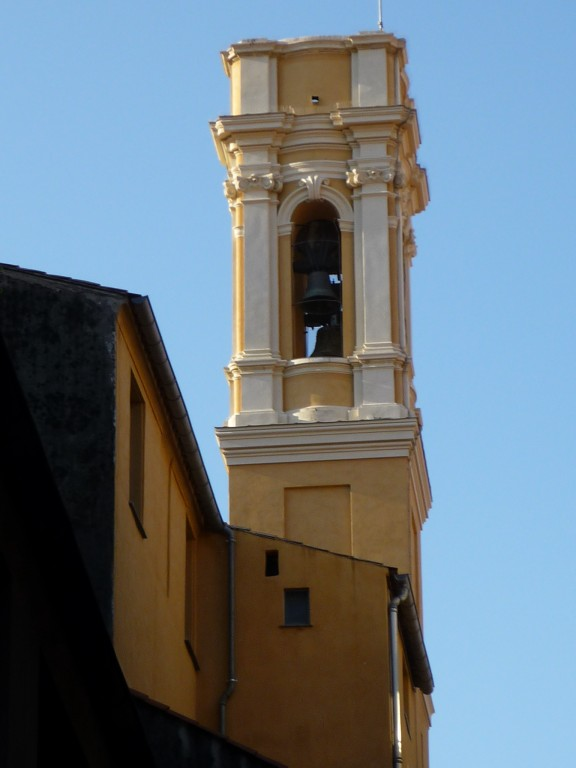 Clocher de la chapelle Sainte Croix des pénitents blancs de Nice, après sa restauration de septembre 2011.